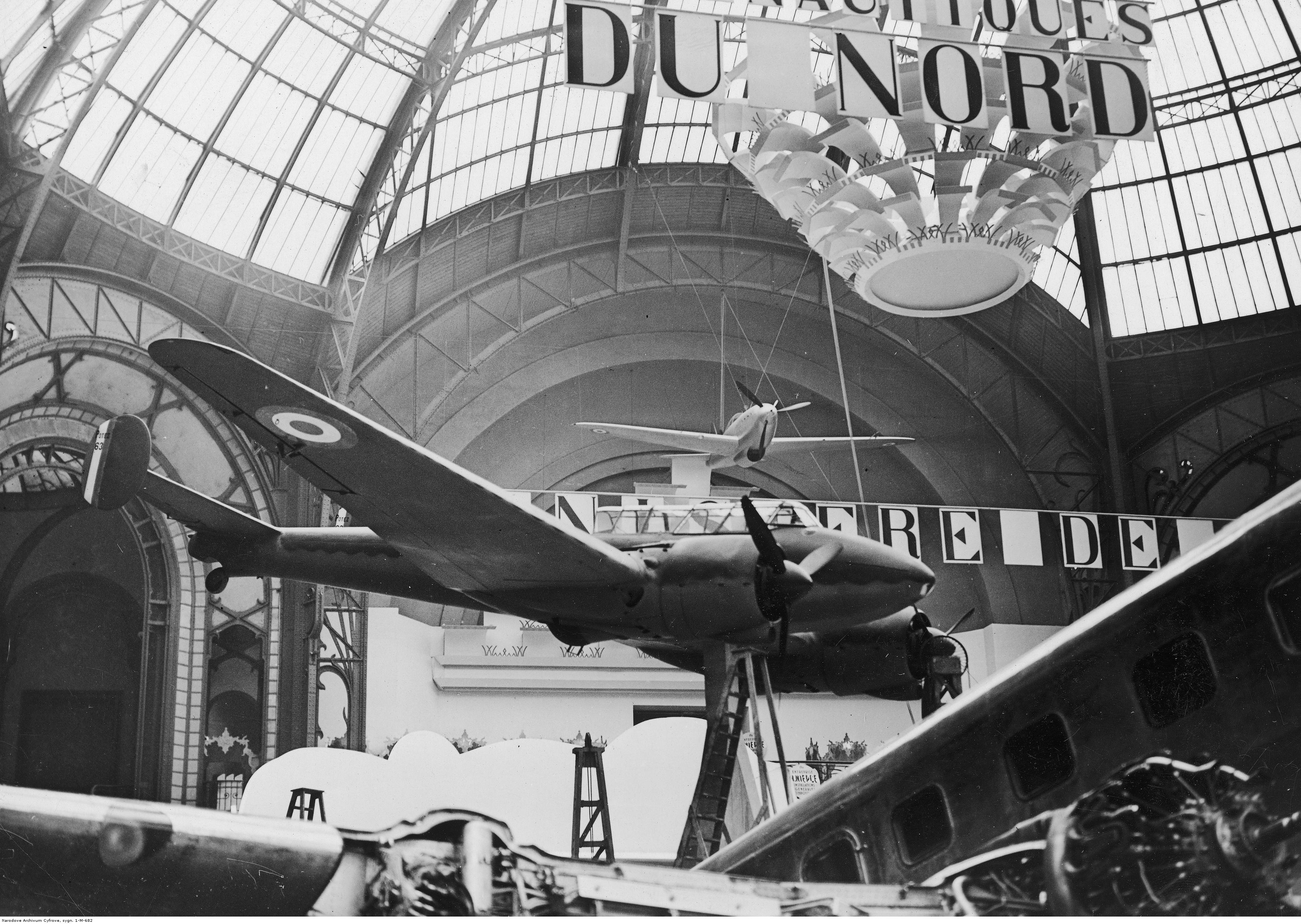 Fragment ekspozycji w hali wystawowej Międzynarodowego Salonu Lotniczego w Paryżu. Na pierwszym planie widoczny bombowiec francuski Potez 63, nad nim myśliwiec francuski Morane-Saulnier MS.406.